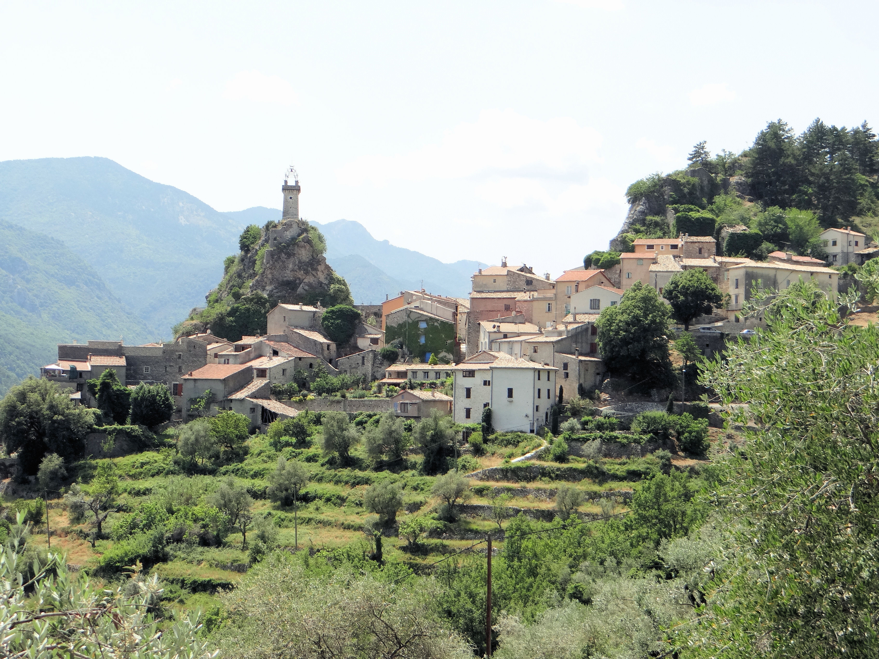 Vue de Sigale à partir de la route de Roquesteron